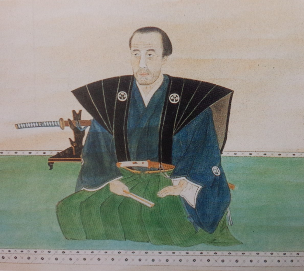 本多正訥の肖像。